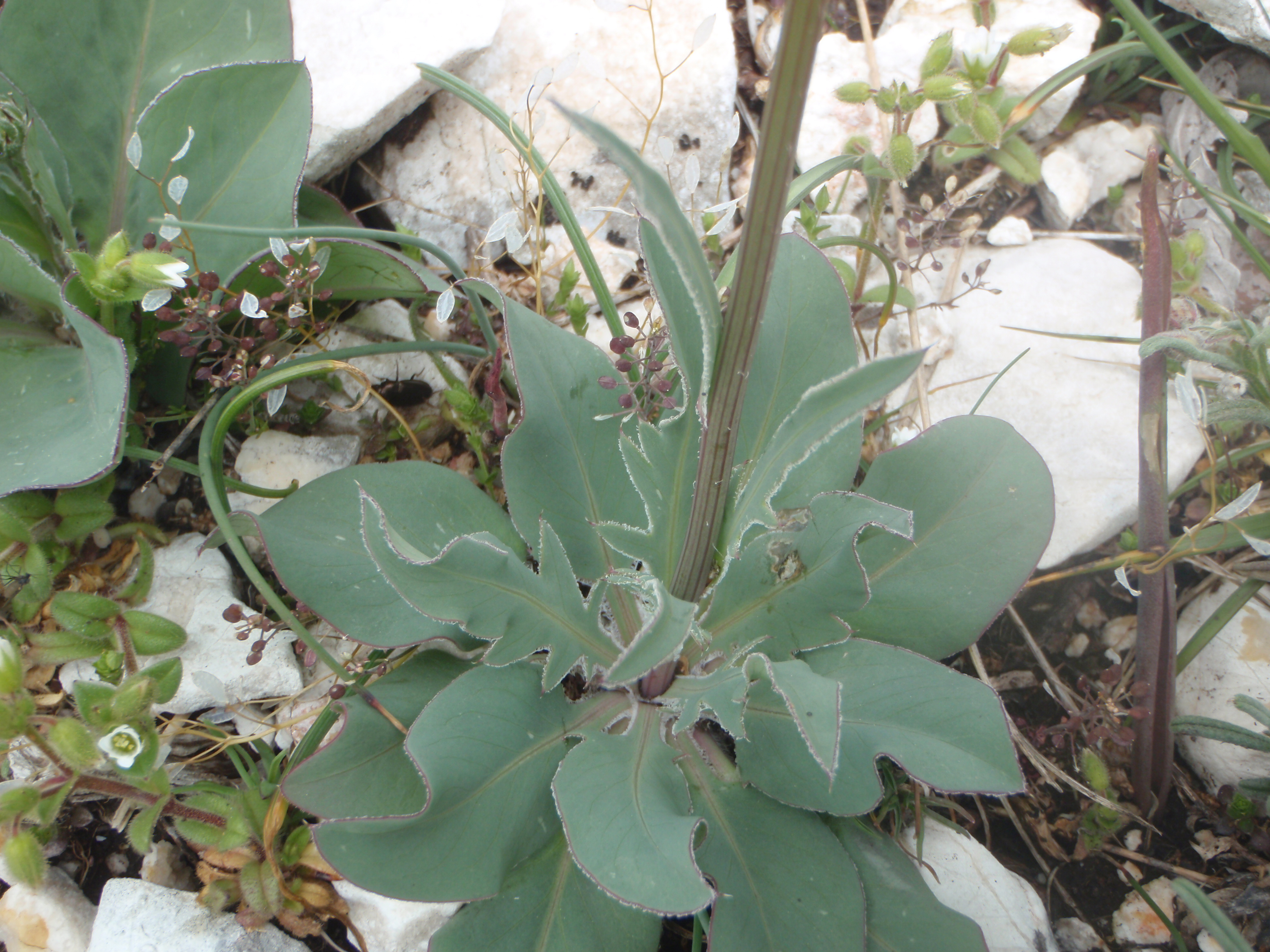 Klasea nudicaulis - Roseta basal de hojas ( con las centrales pinnatifidas). - Nans-les-Pins ( Departamento del Var, Francia) .